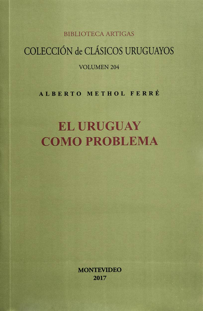 Portada del libro El Uruguay como problema, de Alberto Methol Ferré. Edición de la Colección de Clásicos Uruguayos (2017)